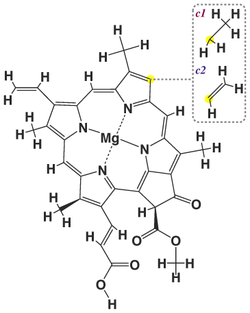 Chlorophyll c